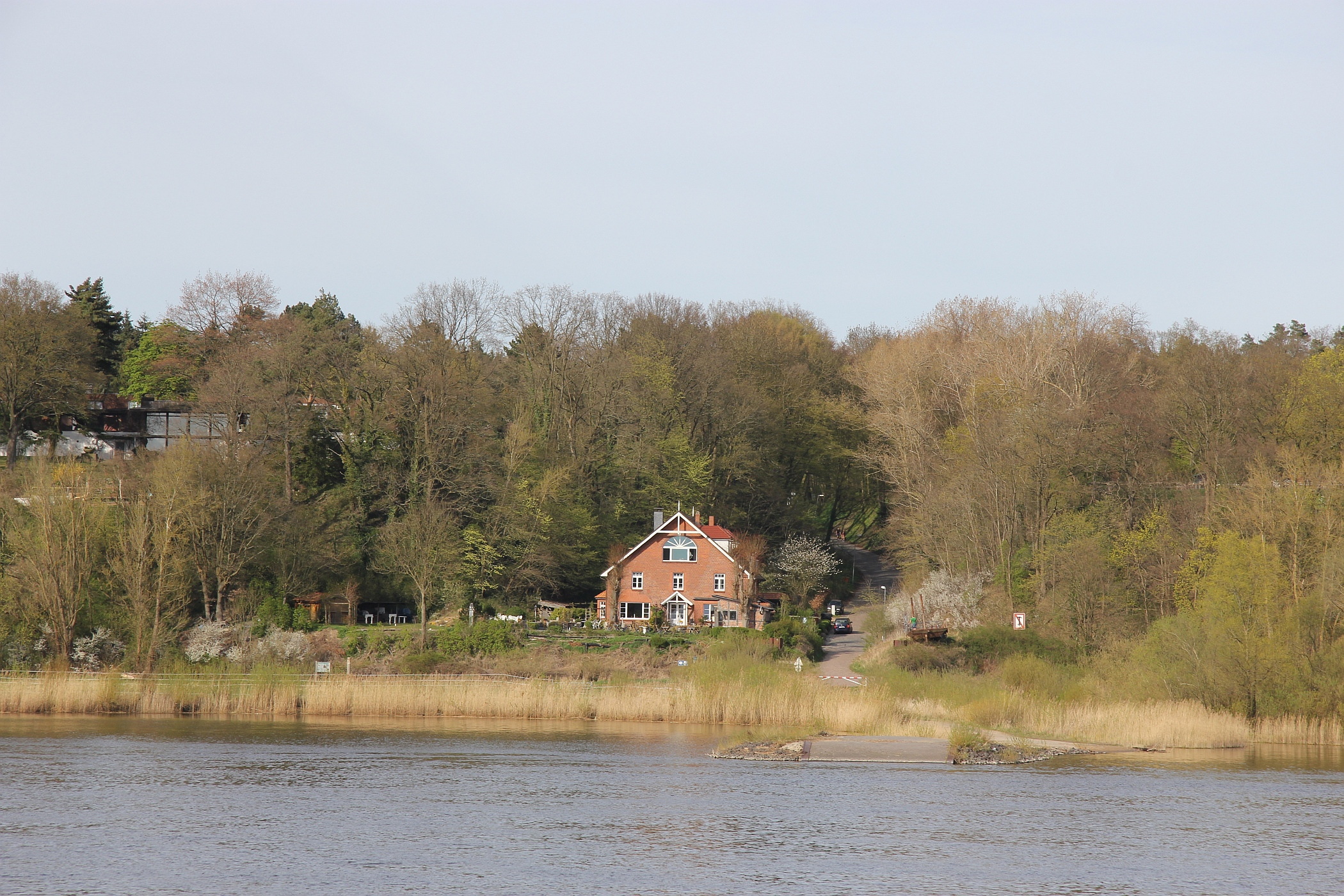 Sandkrug (Schnakenbek), von Artlenburg aus gesehen